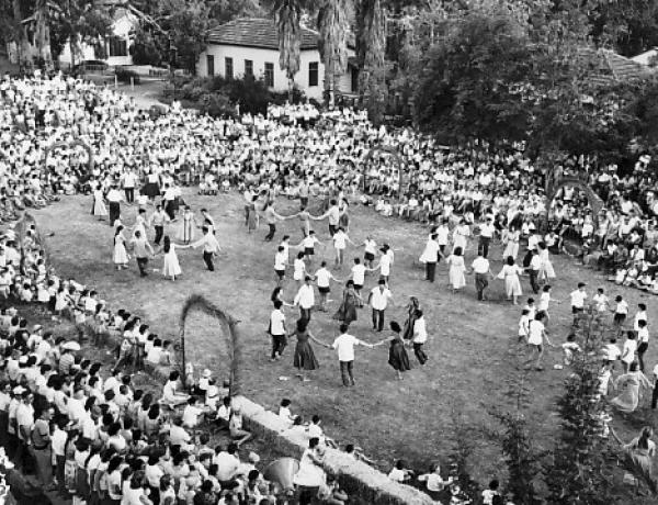 חג ביכורים בחצר הגדולה שנת 1959 - מעגלי הרוקדים